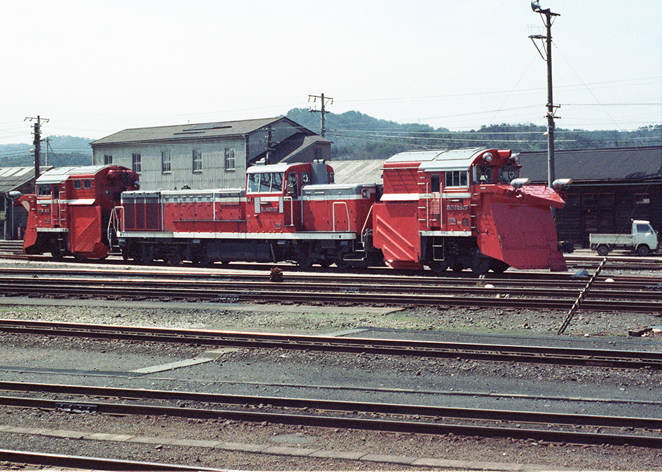 国鉄 DE15 2525 豊岡駅にて